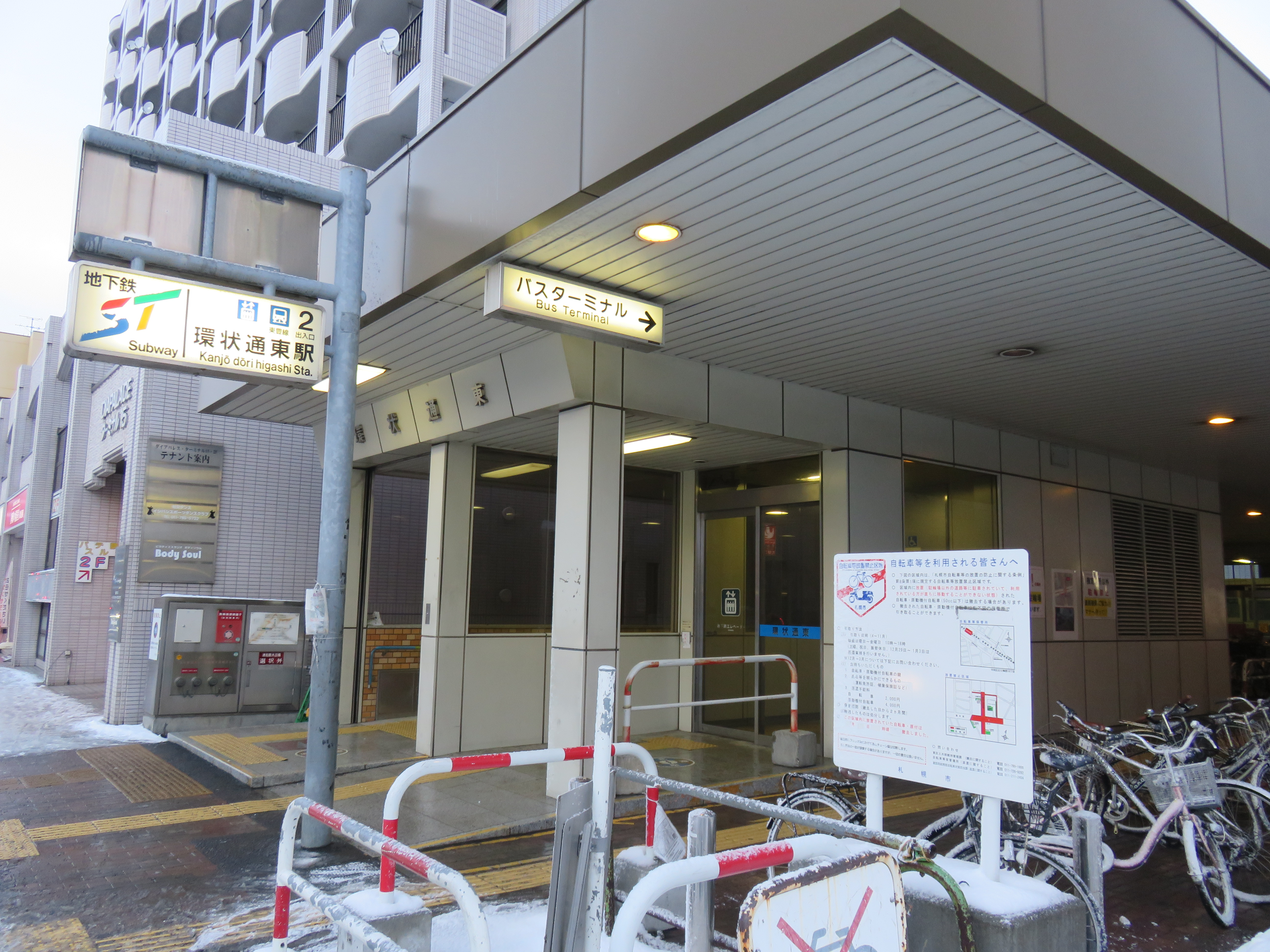 環状通東駅2番出入口